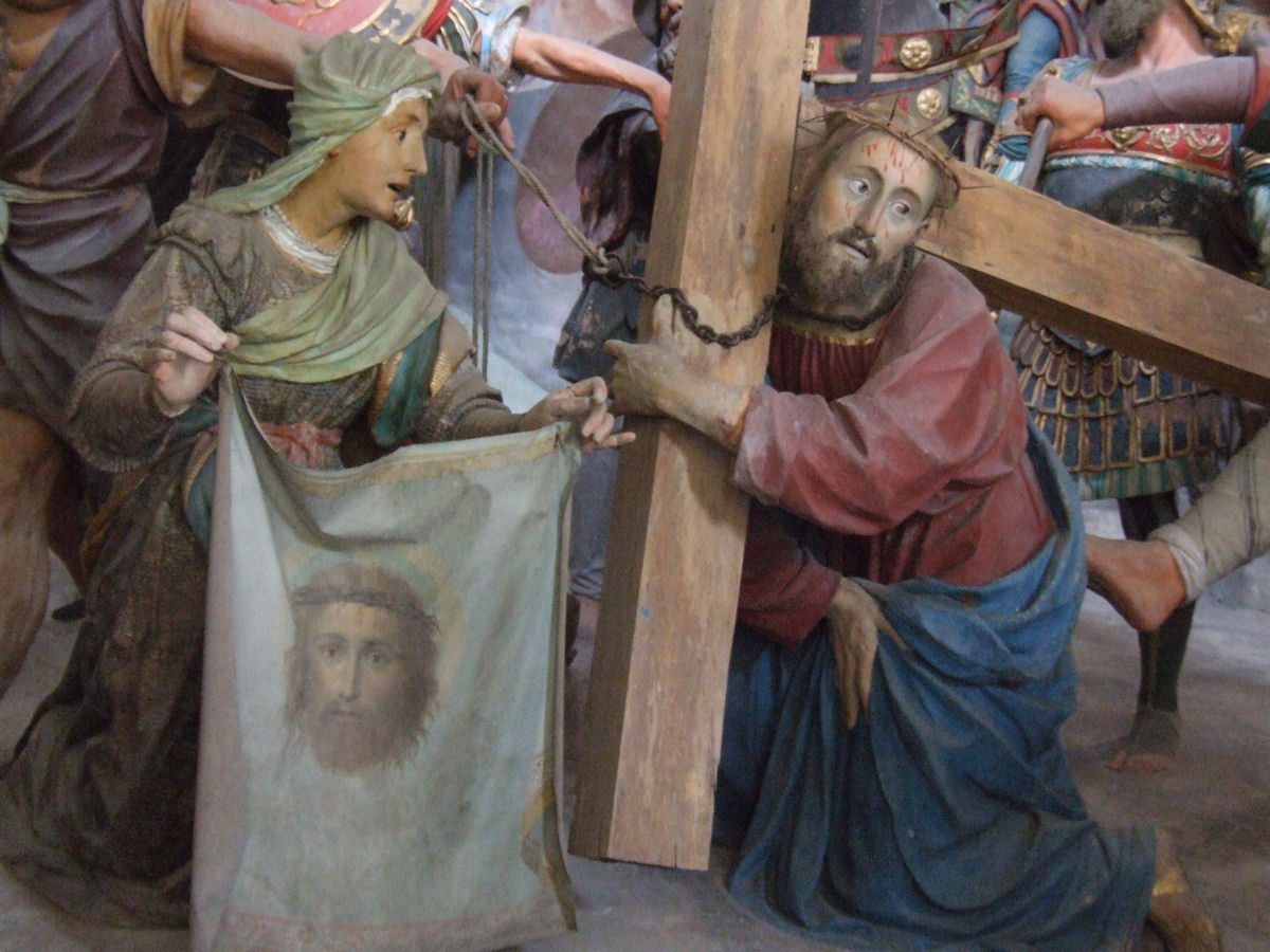 Chapel 36 - The Road to Calvary - Polychrome clay statues by Tabacchetti e Giovanni d'Enrico and frescos Sacro Monte di Varallo Native nameSacro Monte di VaralloLocationVarallo Sesia, Piedmont, ItalyCoordinates45° 49′ 10.95″ N, 8° 15′ 19.01″ E WebsiteSacro Monte di Varallo